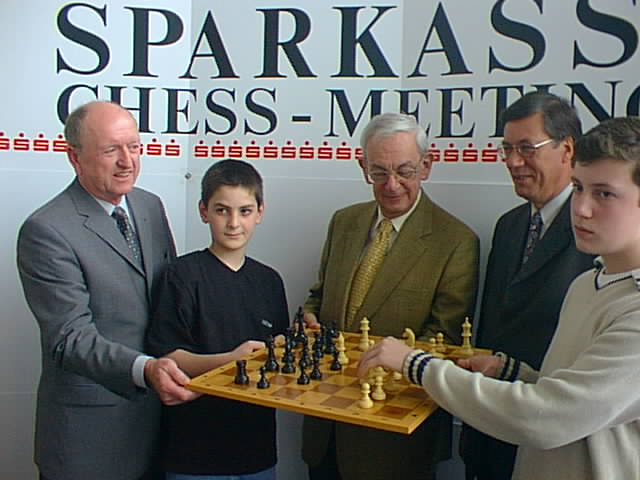 Helmut Kohls (Vorstandsvorsitzender Stadtsparkasse Dortmund), David Baramidze, Egon Ditt (Präsident Deutscher Schachbund), Dr. Gerhard Langemeyer (Oberbürgermeister Stadt Dortmund) und Arkadij Naiditsch , 14. Mai 2001 in Dortmund.